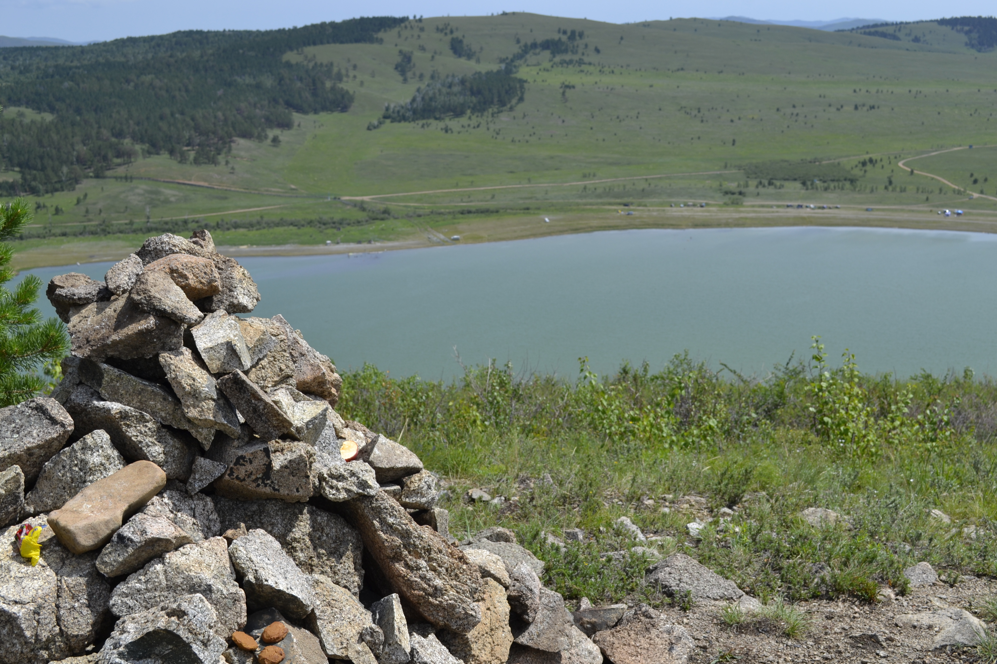 Акшинский заказник, Акшинский район This image is related to the protected area of Russia number 7510013